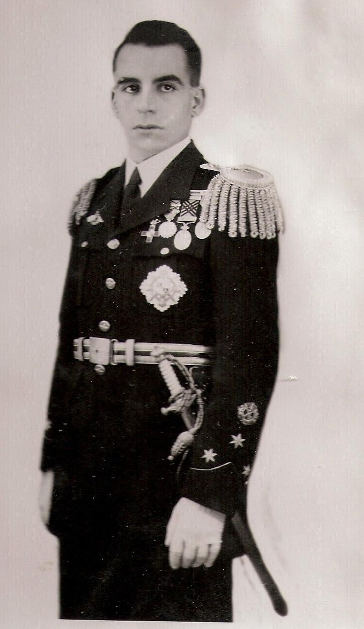 El General de Aviación Don Fernando Villalba Rubio cuando ostentaba el Grado de Capitán